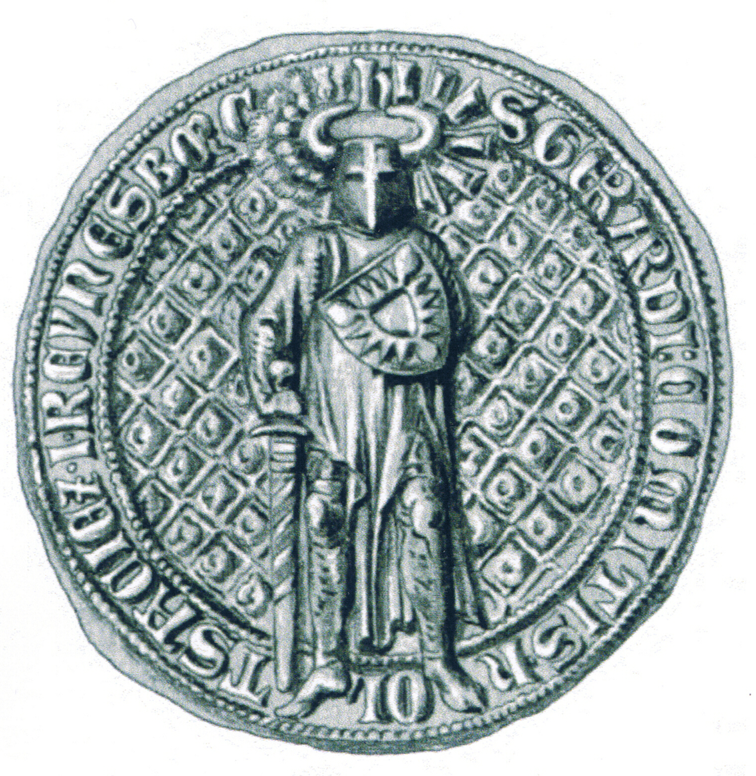 Siegel des Gerhard III. (* um 1293; † 1. April 1340 in Randers) , Sohn von Heinrich I. (Holstein-Rendsburg) und Heilwig (1265-nach 1324) die Tochter des Grafen Floris von Bronkhorst. Das Siegel stammt aus der Zeit um 1317.